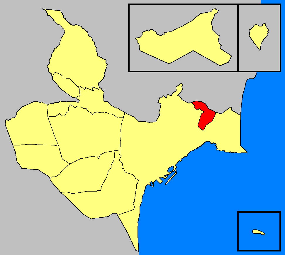 Entidades de población del término municipal de Alicante